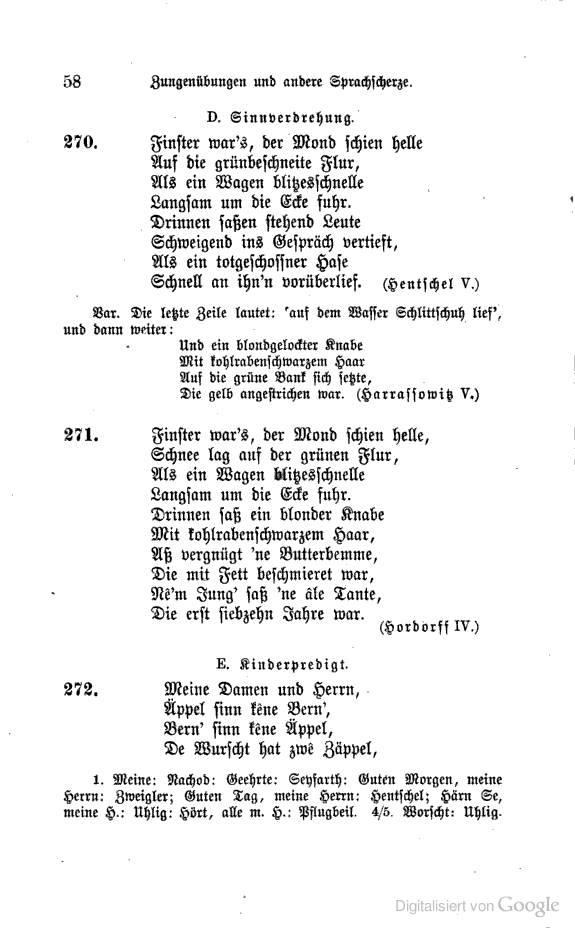 Volkstümliches aus dem Königreich Sachsen auf der Thomasschule gesammelt von Oskar Dähnhardt, Leipzig 1898, S. 58